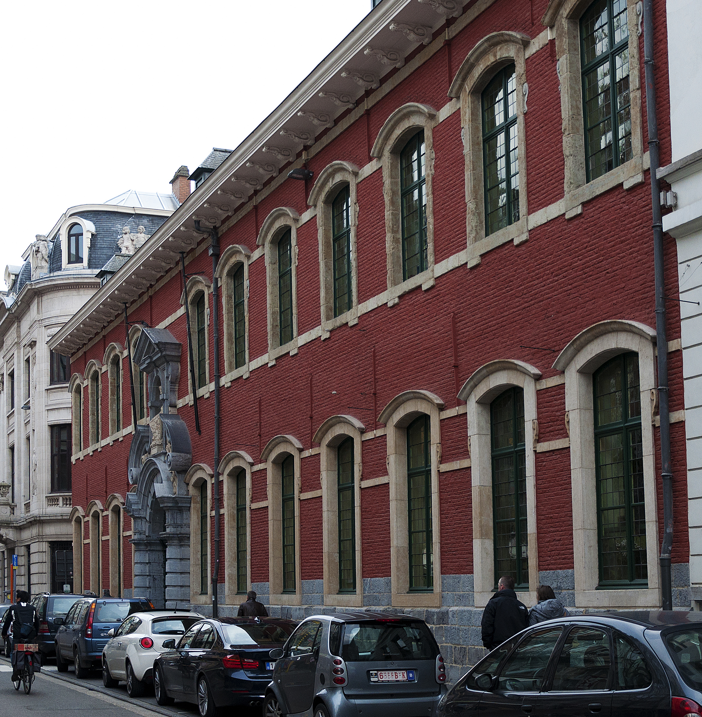 De Emile Braunschool of voormalig Jezuïetencollege van Gent, België